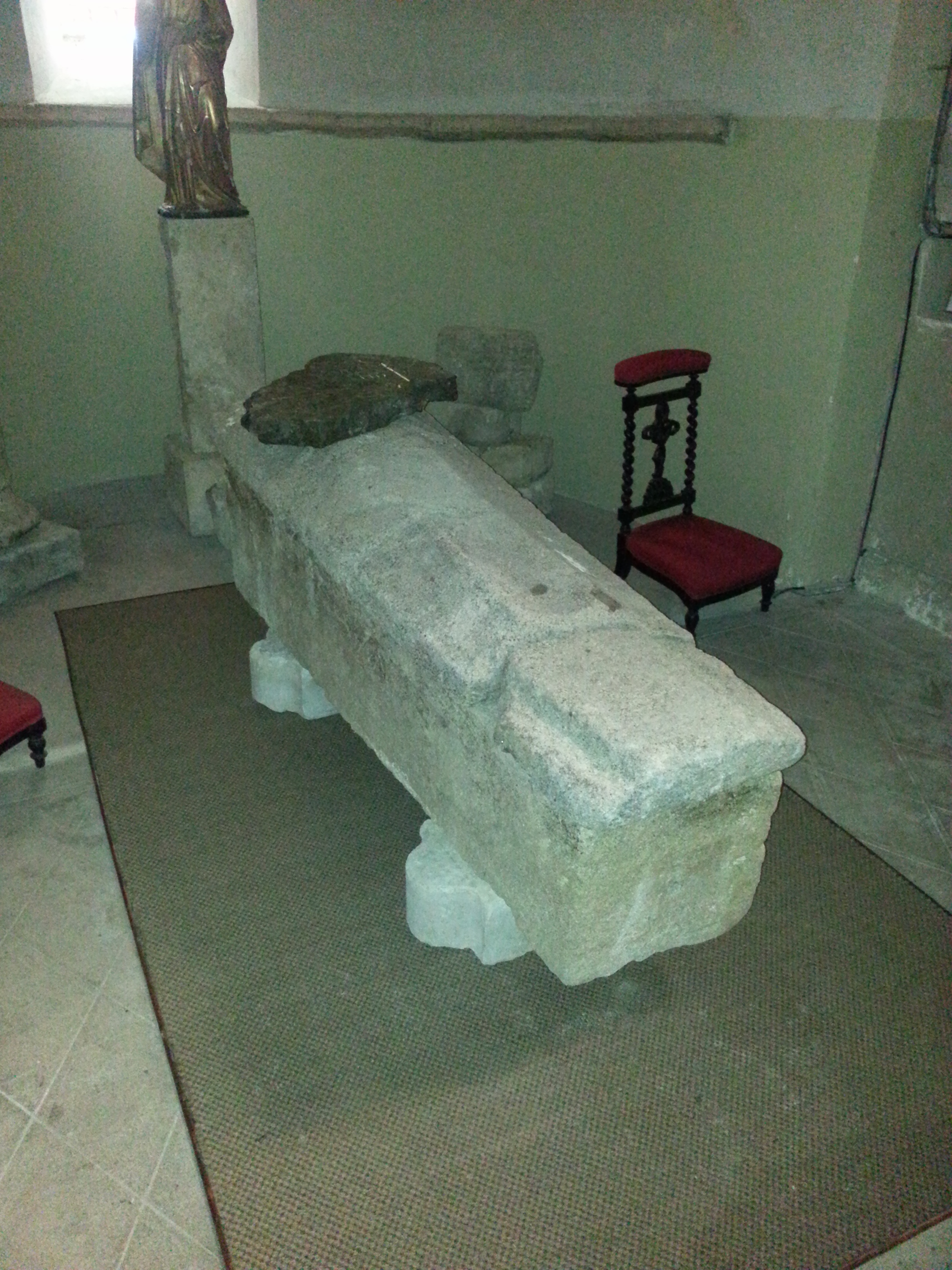 Sarcophage dit de saint Mazeran dans l'église de Saint-Mazeran dans l'Allier.